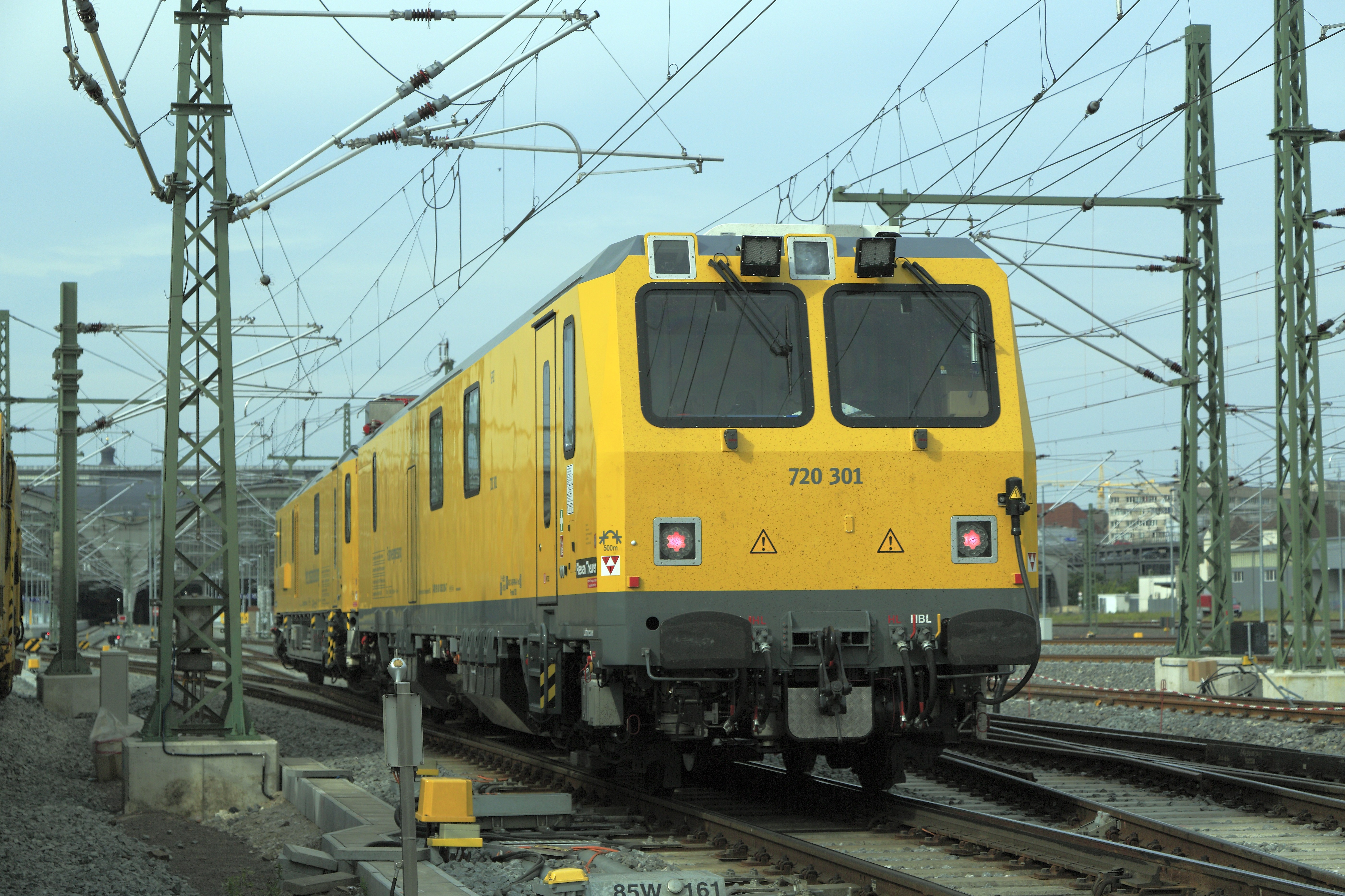 Neugebaute Oberbaumesswagen- und Ultraschallschieneprüfeinheit, Steuerwagen. Die von Osten gekommende Einheit fährt in Richtung Hallengleis 13.